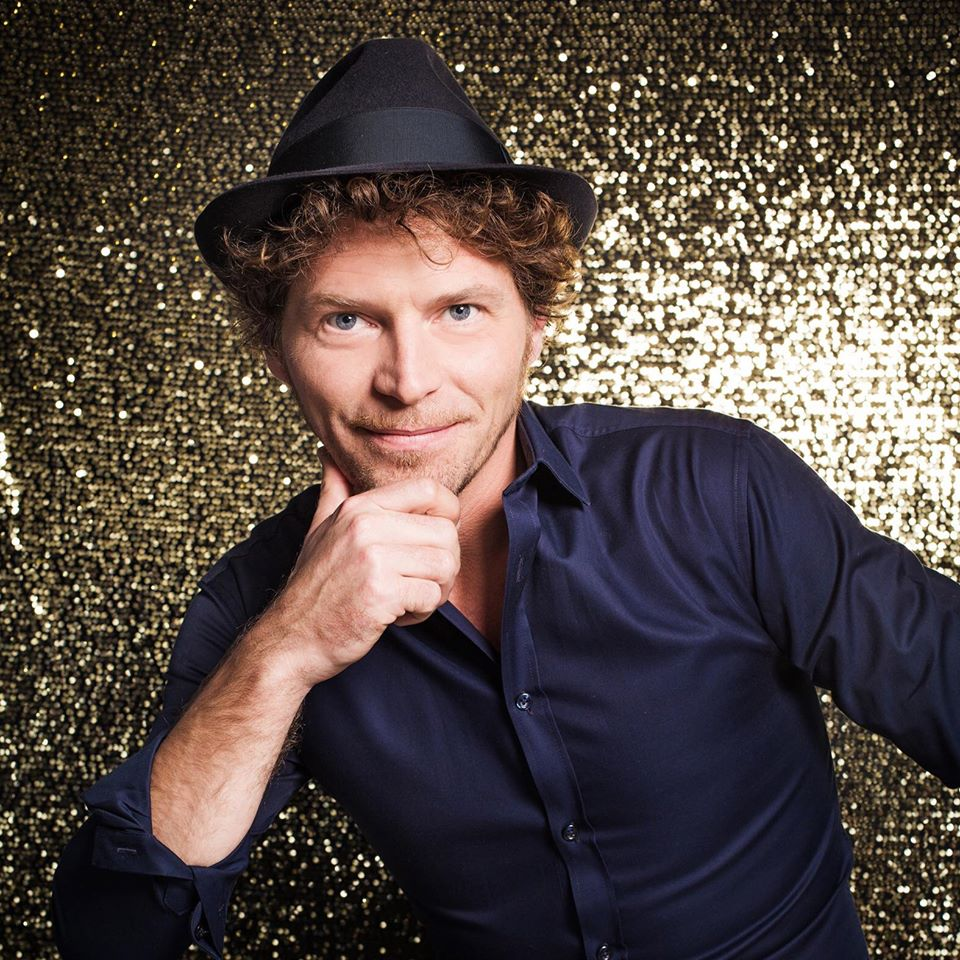 Marco Maccarini - book Amici 15